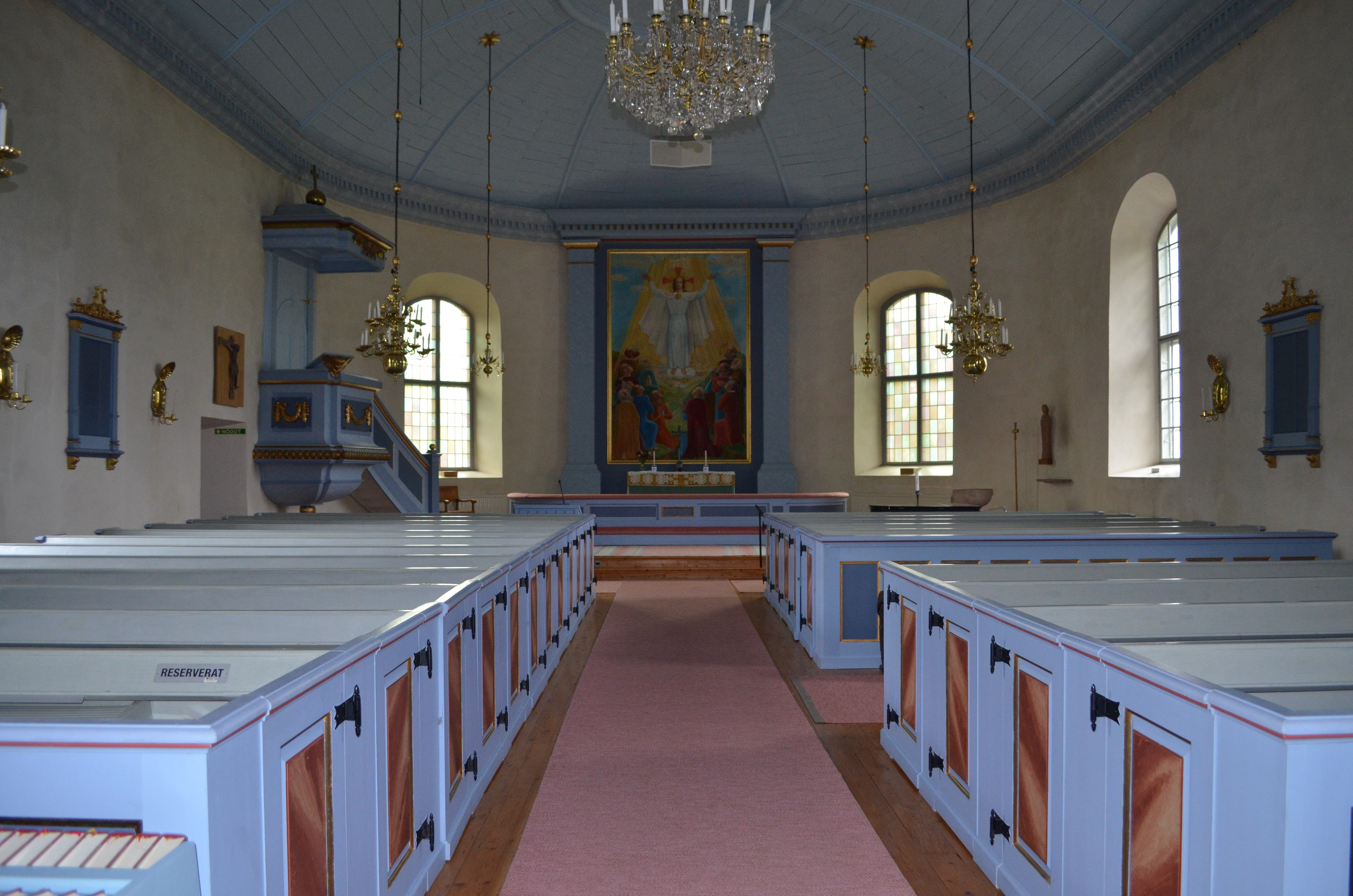 Kyrkorumet